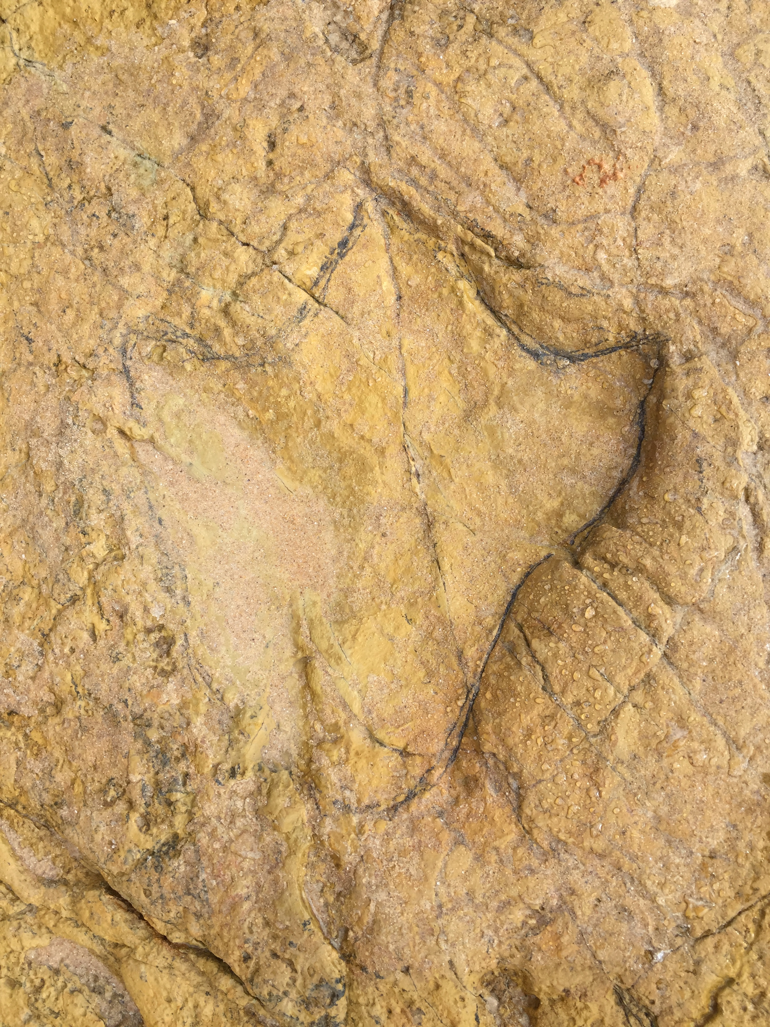 spur eines Ornithopoda am Strand von Salema